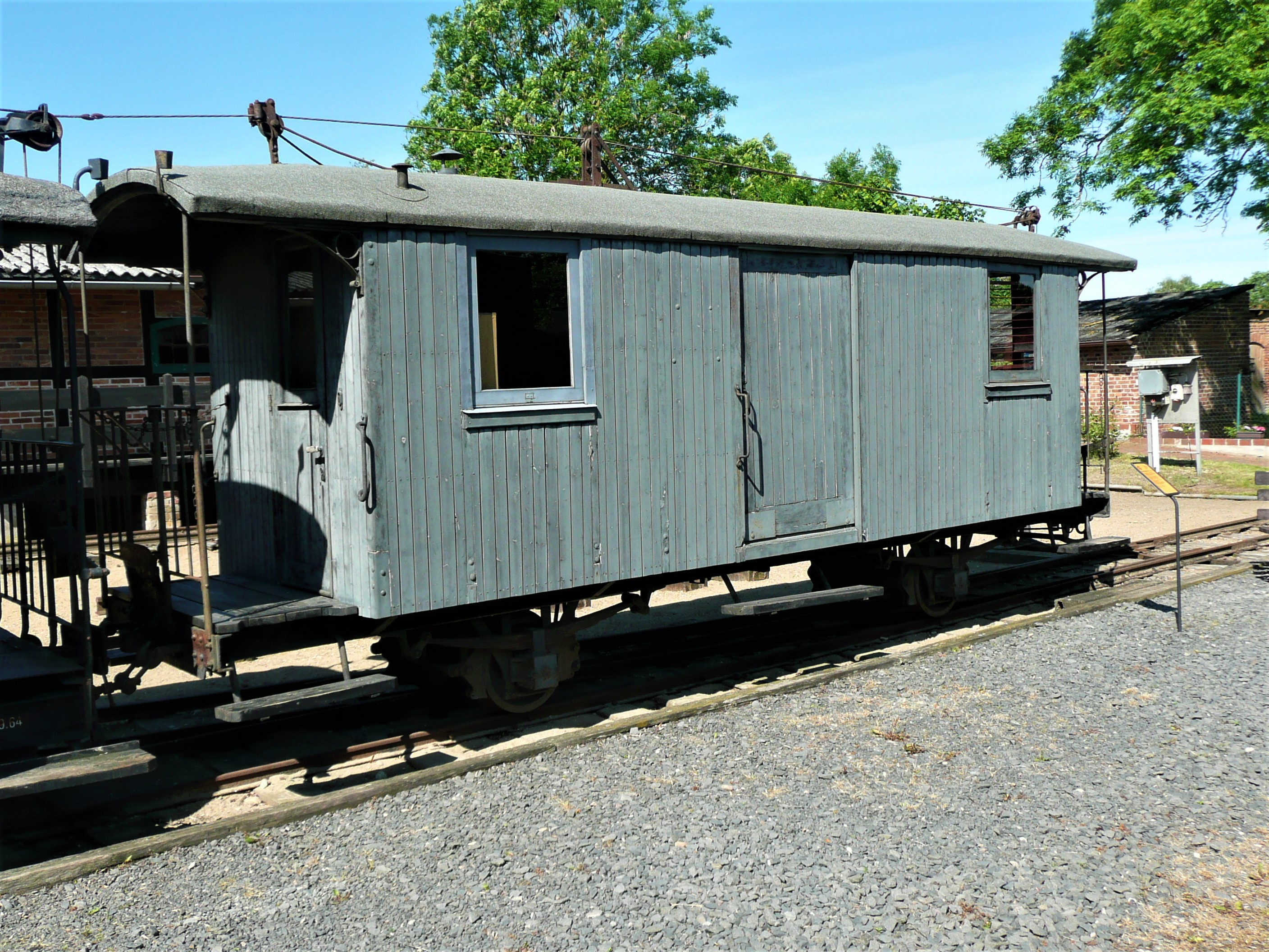 Gepäckwagen 975-111 der Rüg. Kleinbahn im Eisenbahnmuseum Gramzow